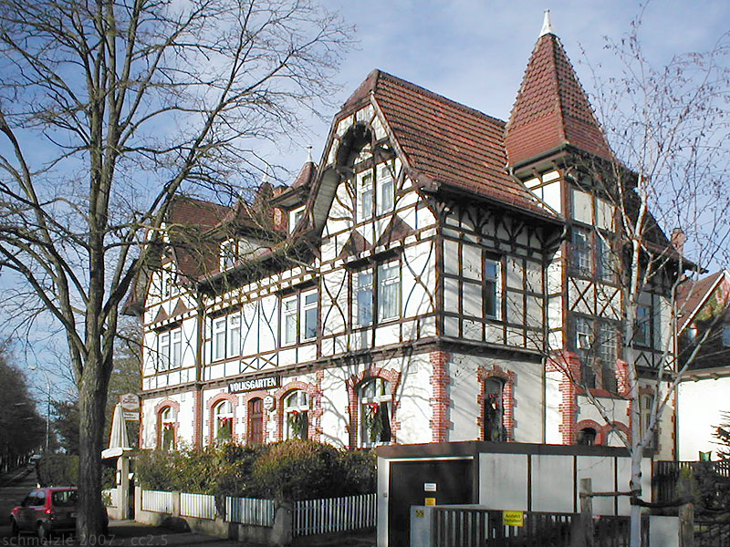 Hist. Gasthaus Volksgarten in der Pfühlstraße 57 in Heilbronn